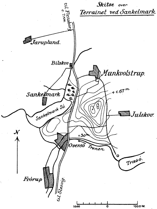 Situationskort Sankelmark, syd for Flensborg